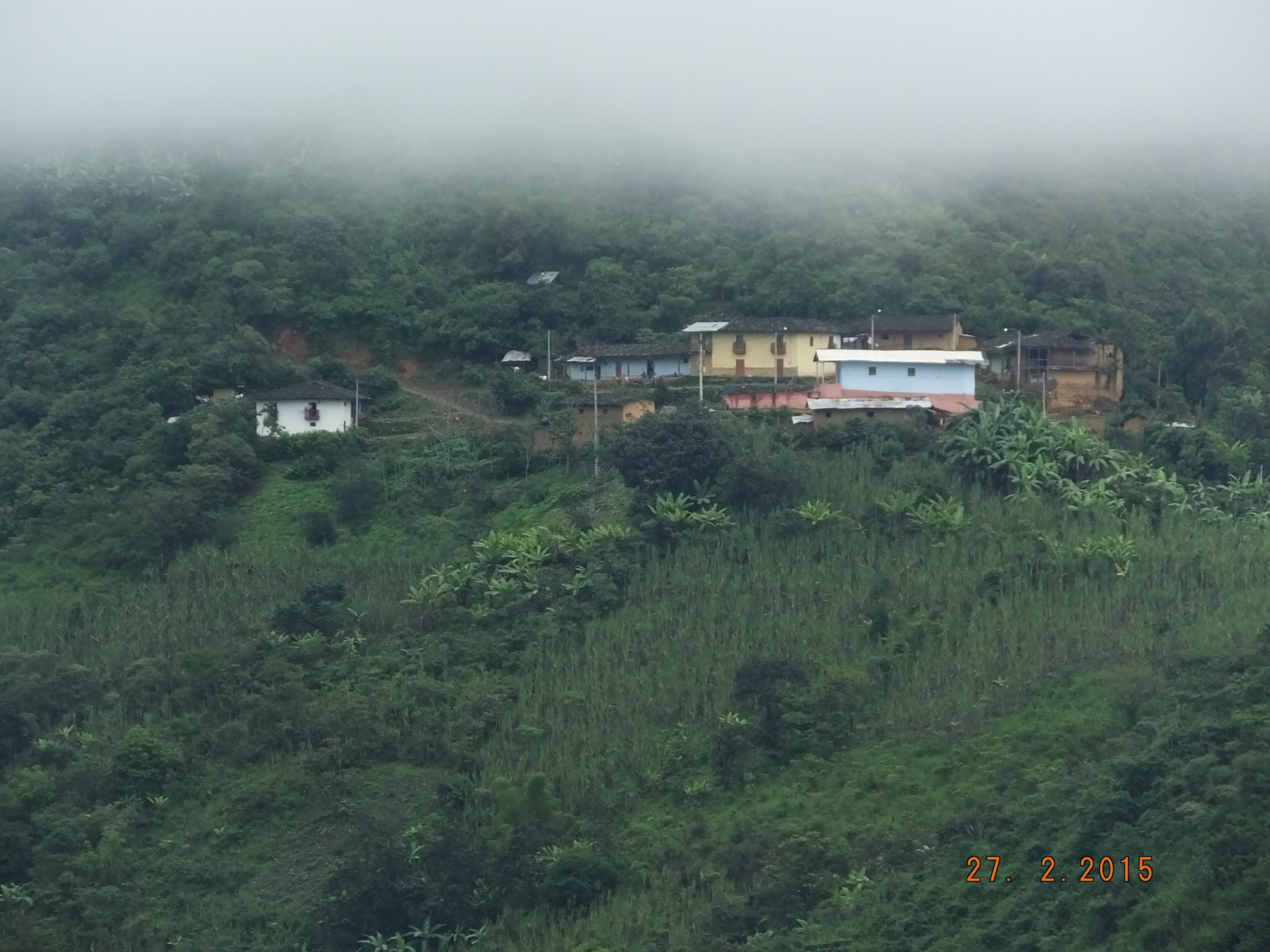 Es uno de los caseríos del distrito de Sicchez que en 1925, en el fenómeno del niño de ese año se vio fuertemente afectado, un dantesco derrumbe arrasó con chacras de cultivo, trapiches e incluso algunas personas que nunca fueron recuperadas.